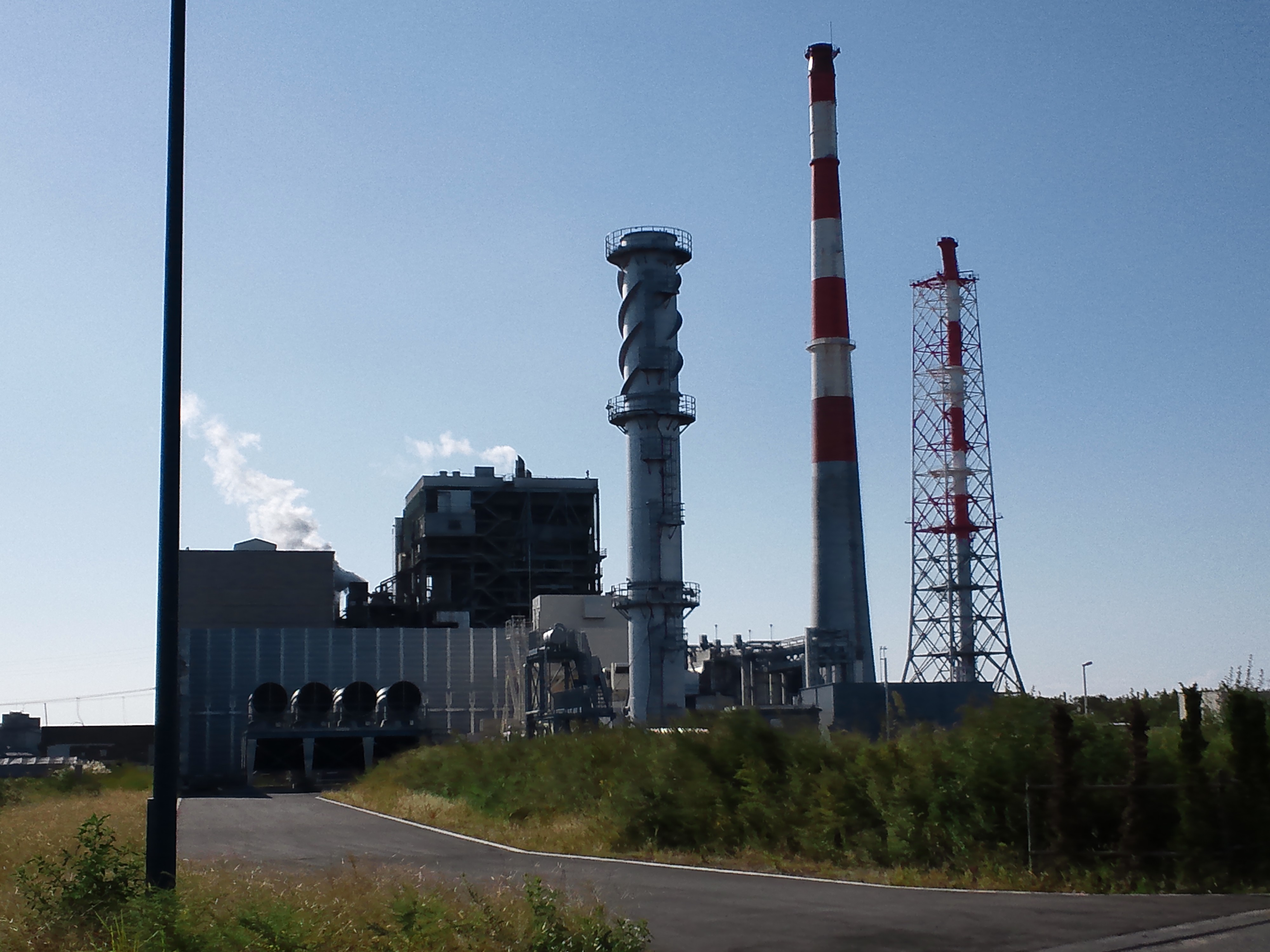 東北電力新潟火力発電所